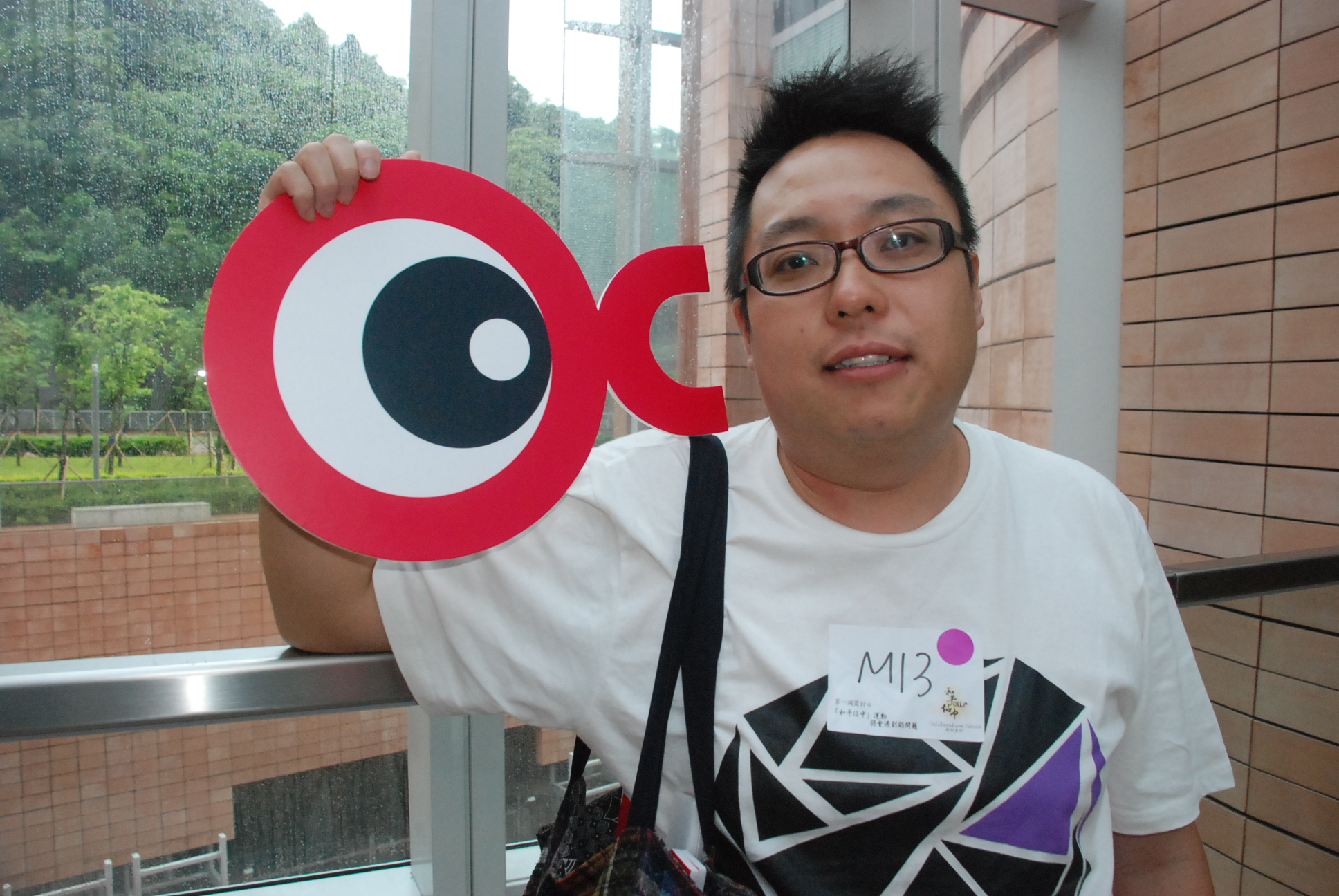 Tam Tak Chi